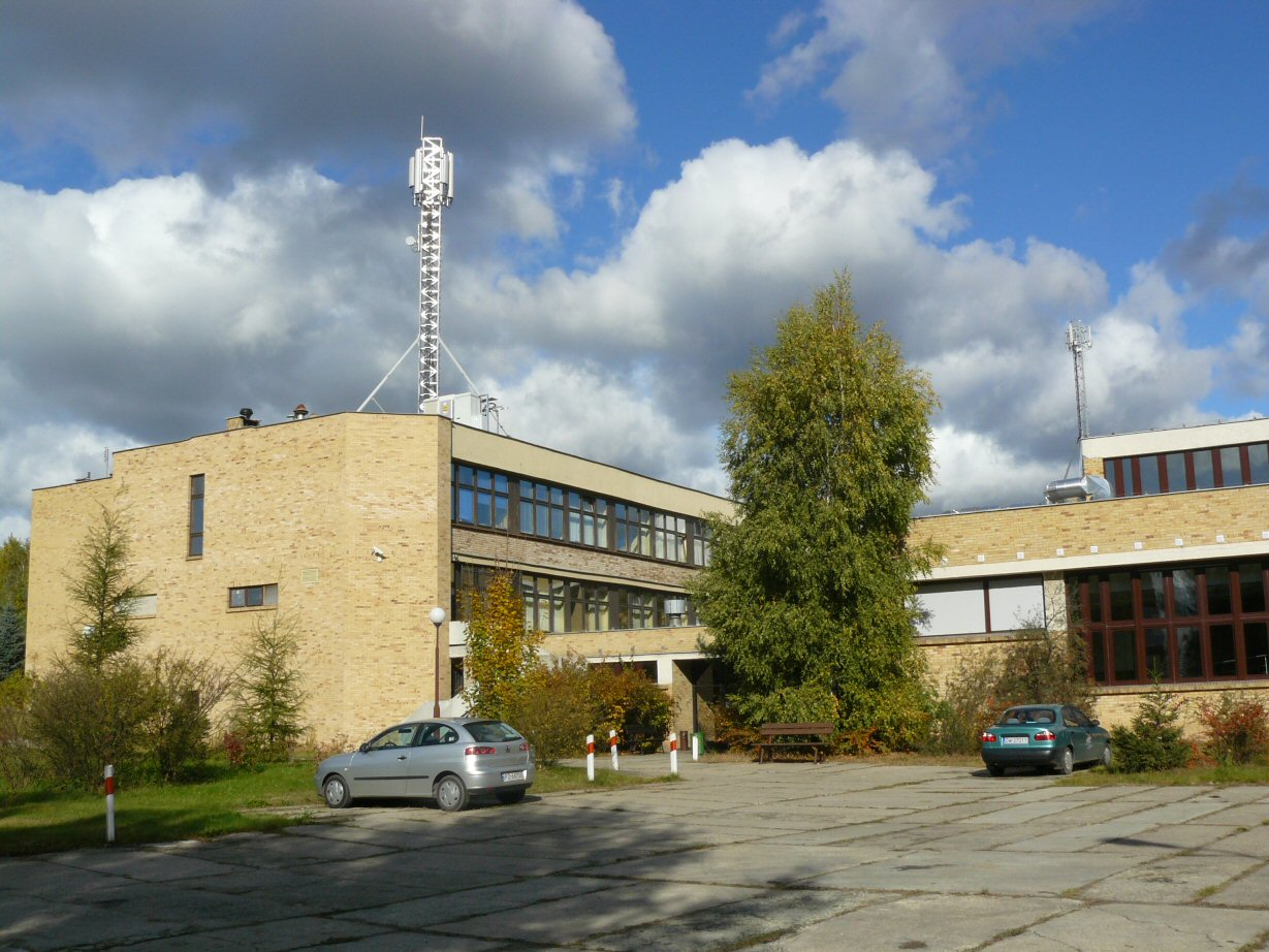 Wydział Nauk Geograficznych i Geologicznych Uniwersytetu im. Adama Mickiewicza